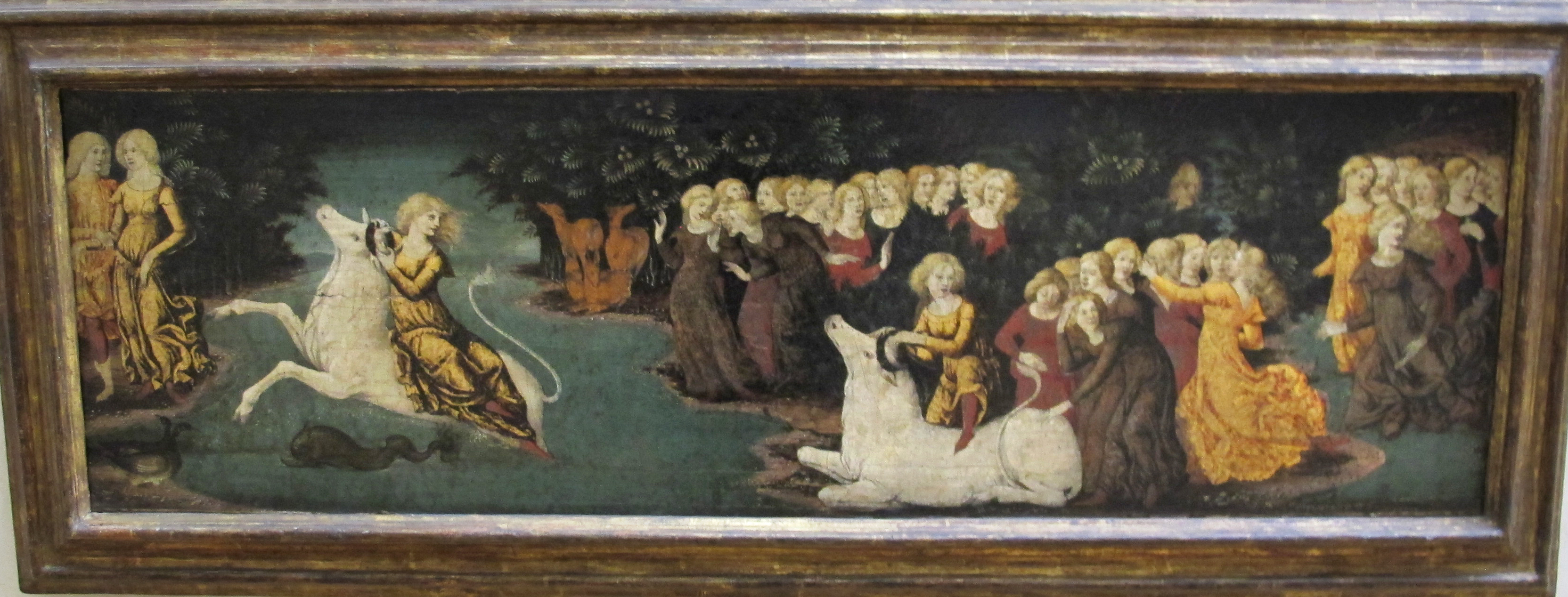 Pittura italiana del Quattrocento al Louvre, Parigi